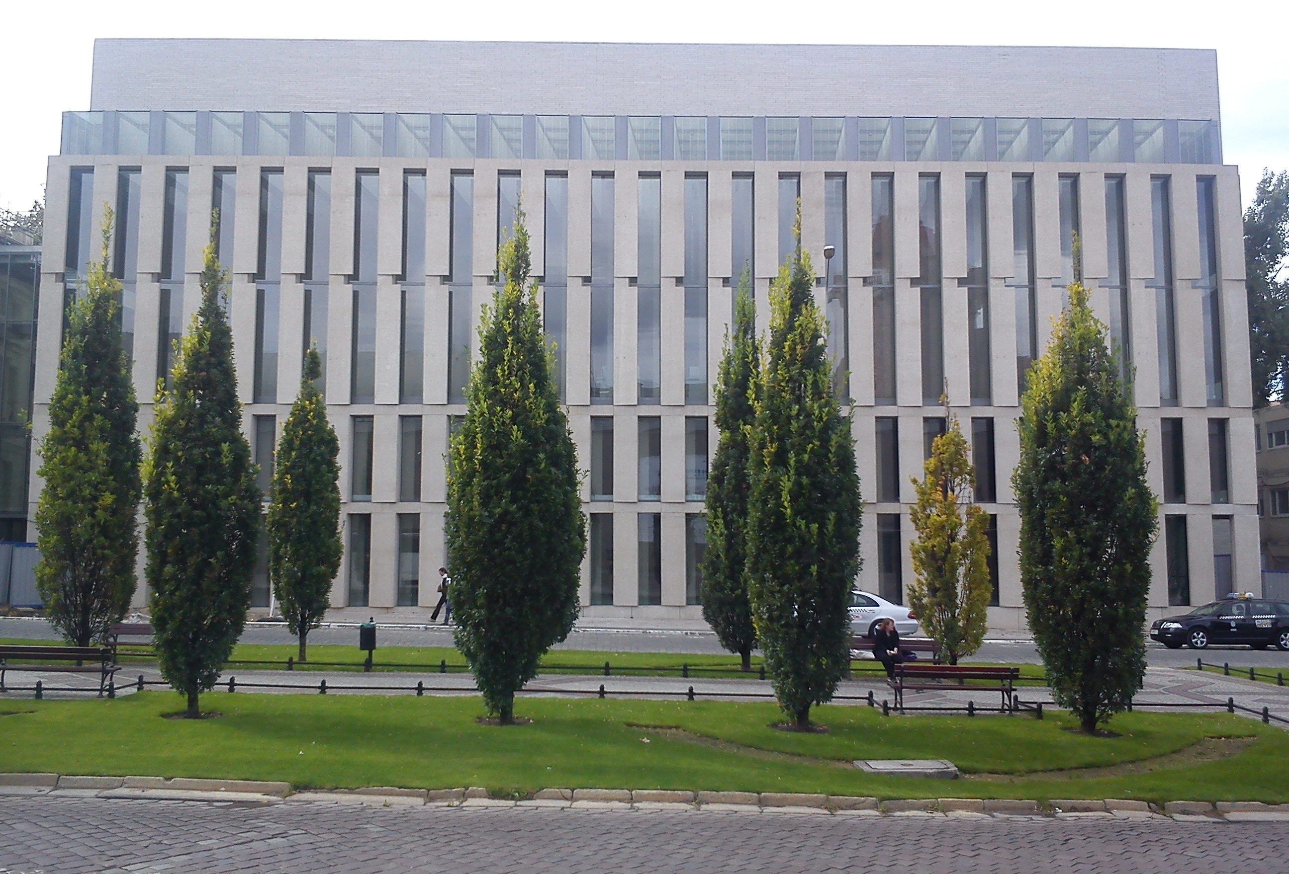 Nw. skrzydło Biblioteki Raczyńskich, Poznań, 9.2012r.